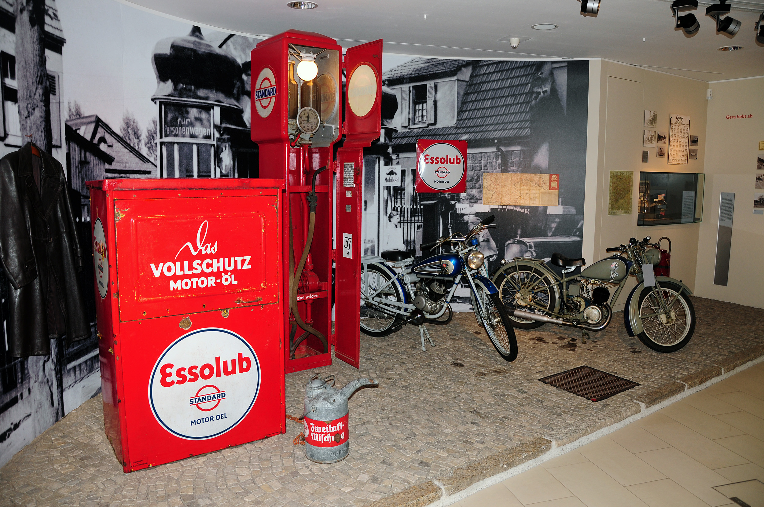 Blick in die Ausstellung im Stadtmuseum Gera, 2009